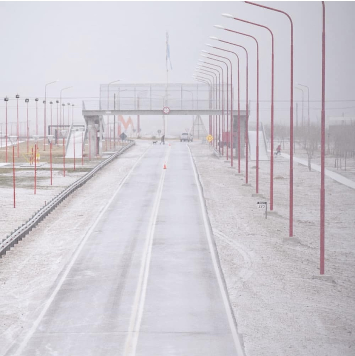 El clima en invierno alcanza temperaturas muy bajas.